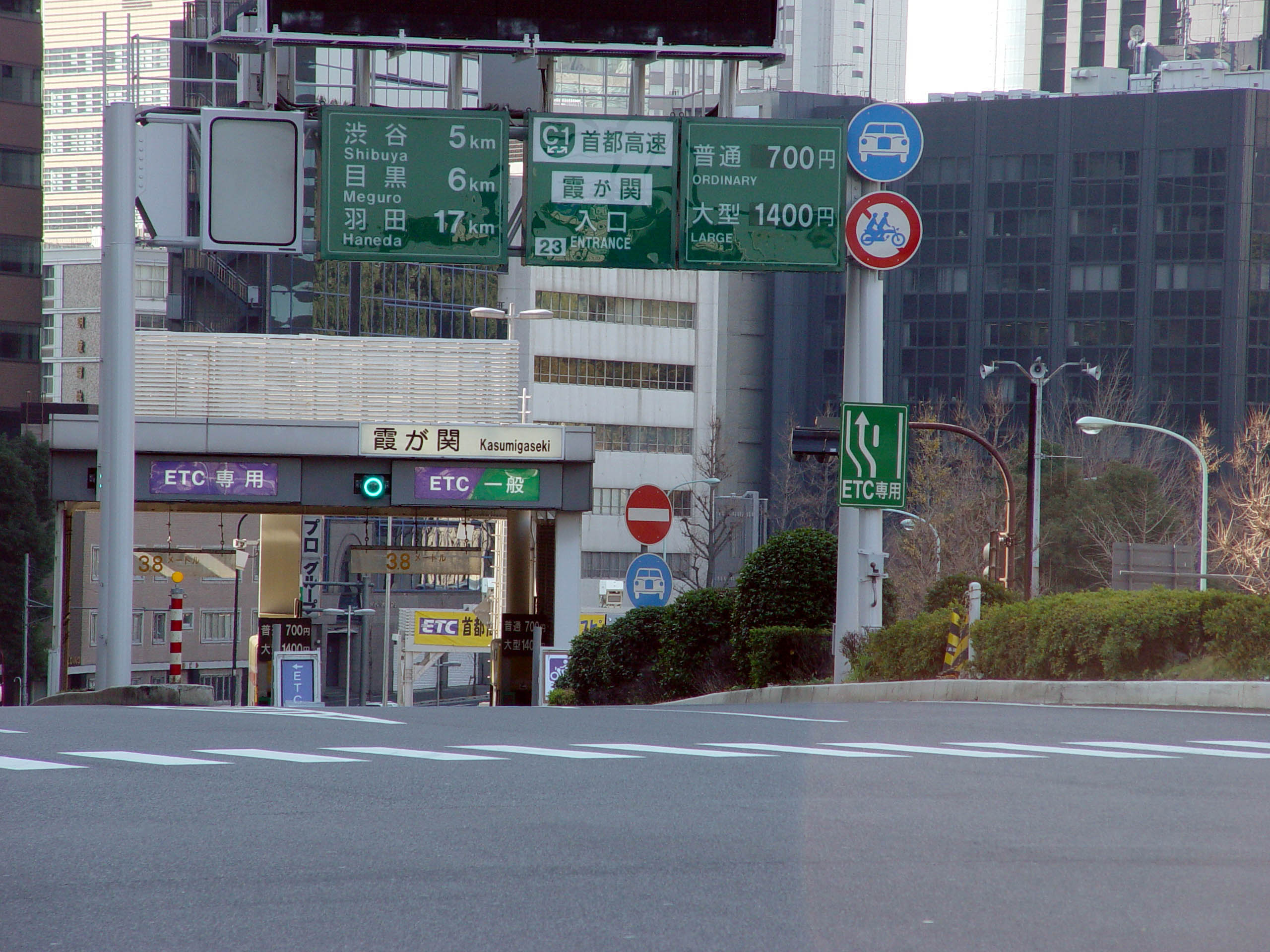 Kasumigaseki interchange 霞ヶ関インターチェンジ